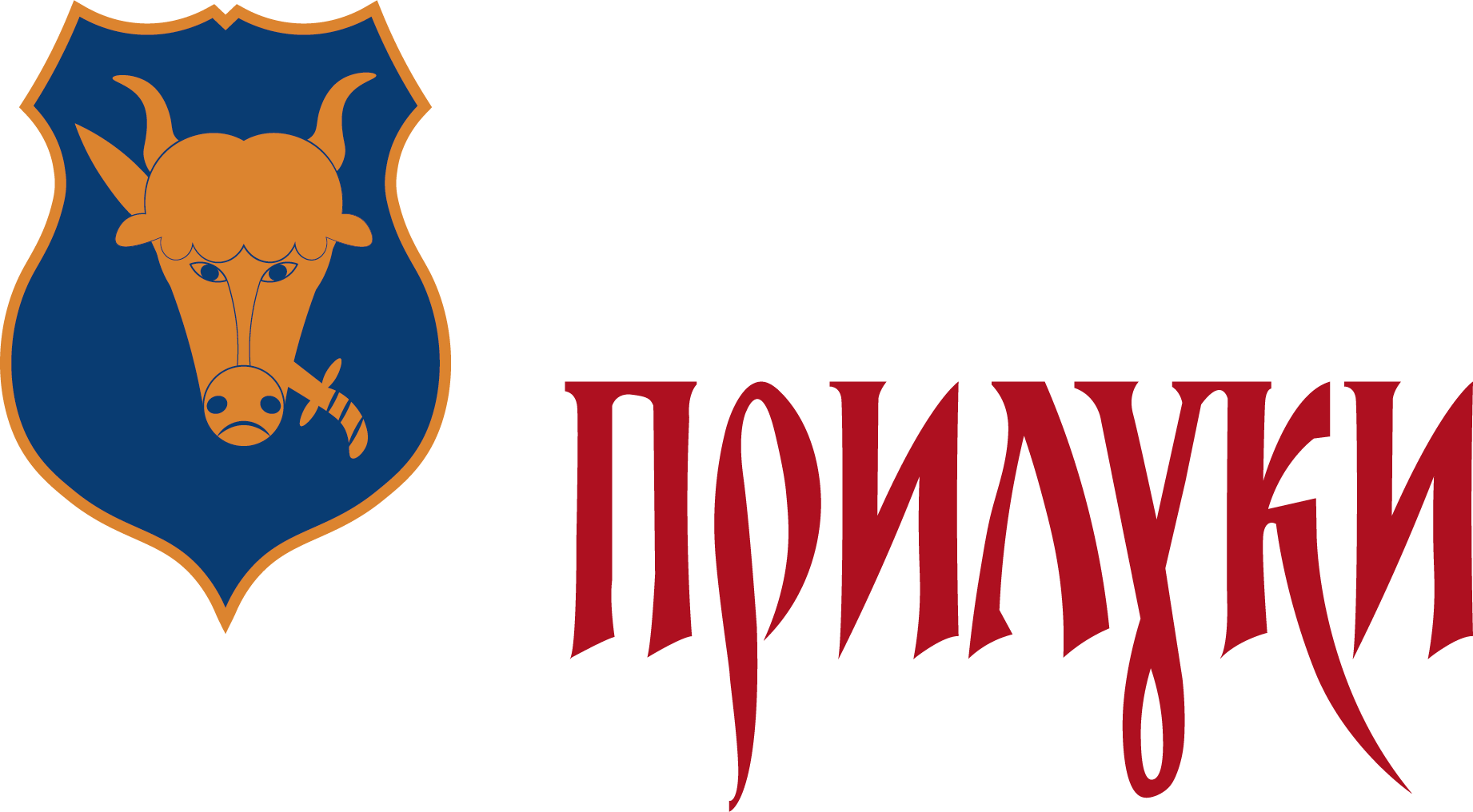 Емблема на Ту-160 бортовий номер 17 червони зі складу 184 ВБАП